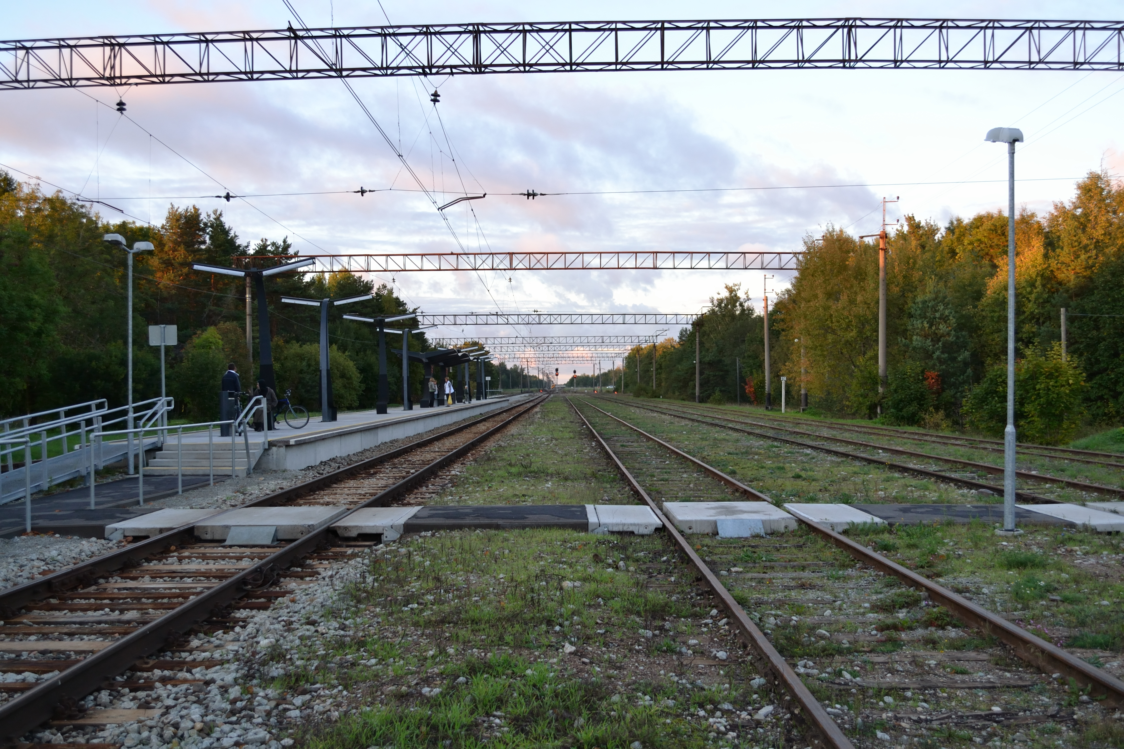 Vasalemma raudteejaam